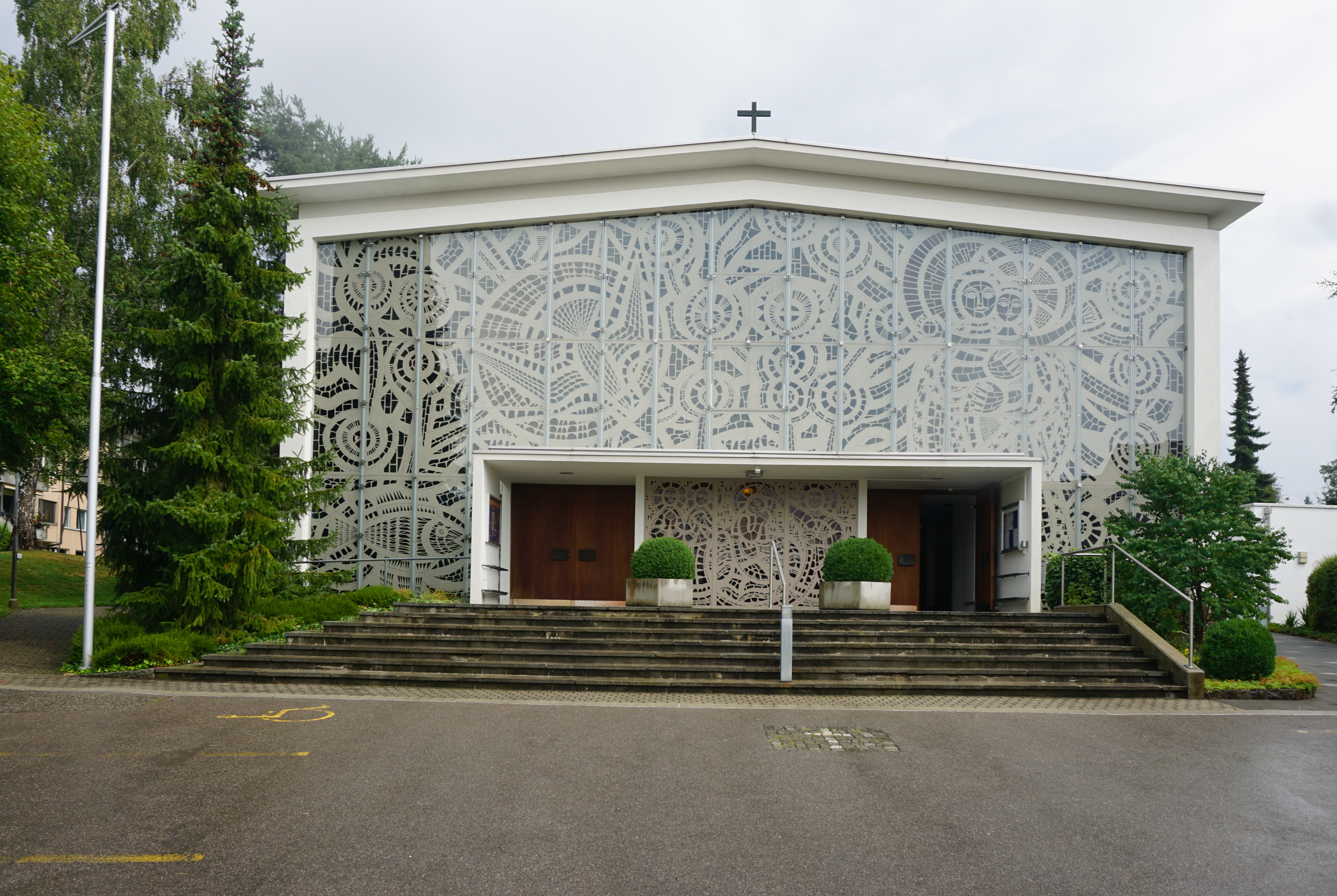 Kirche Maria Geburt, Lyss. Vorplatz und Kirchenfassade von P. Travaglini.